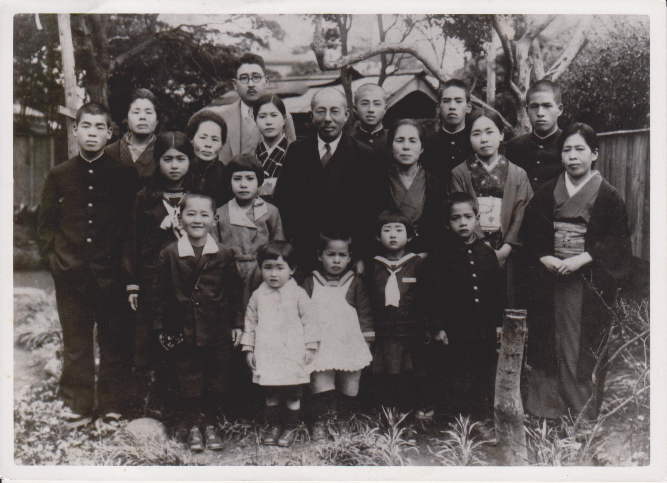 藤井恵照関連写真